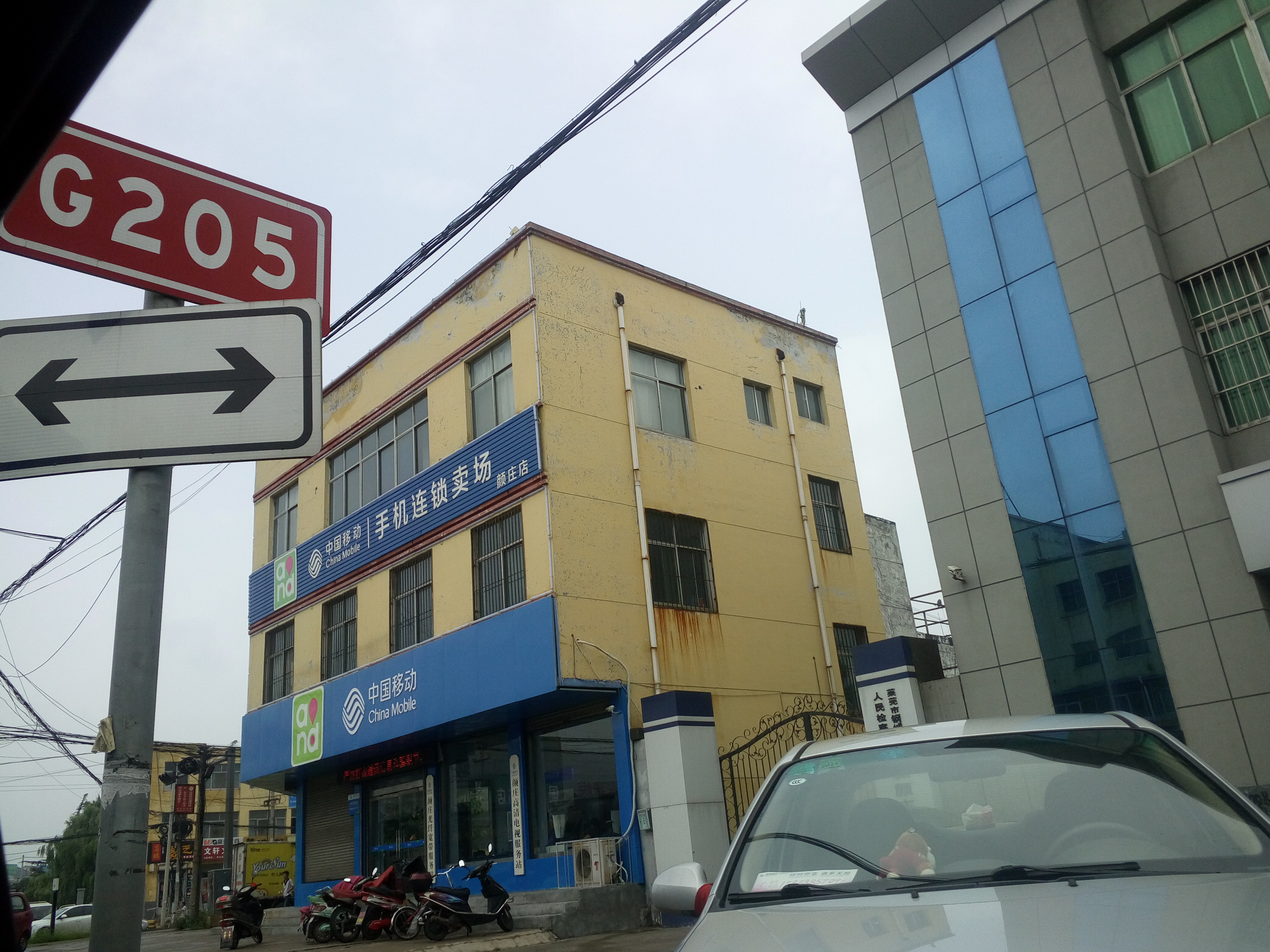 205国道在莱芜市钢城区颜庄镇段的标志牌